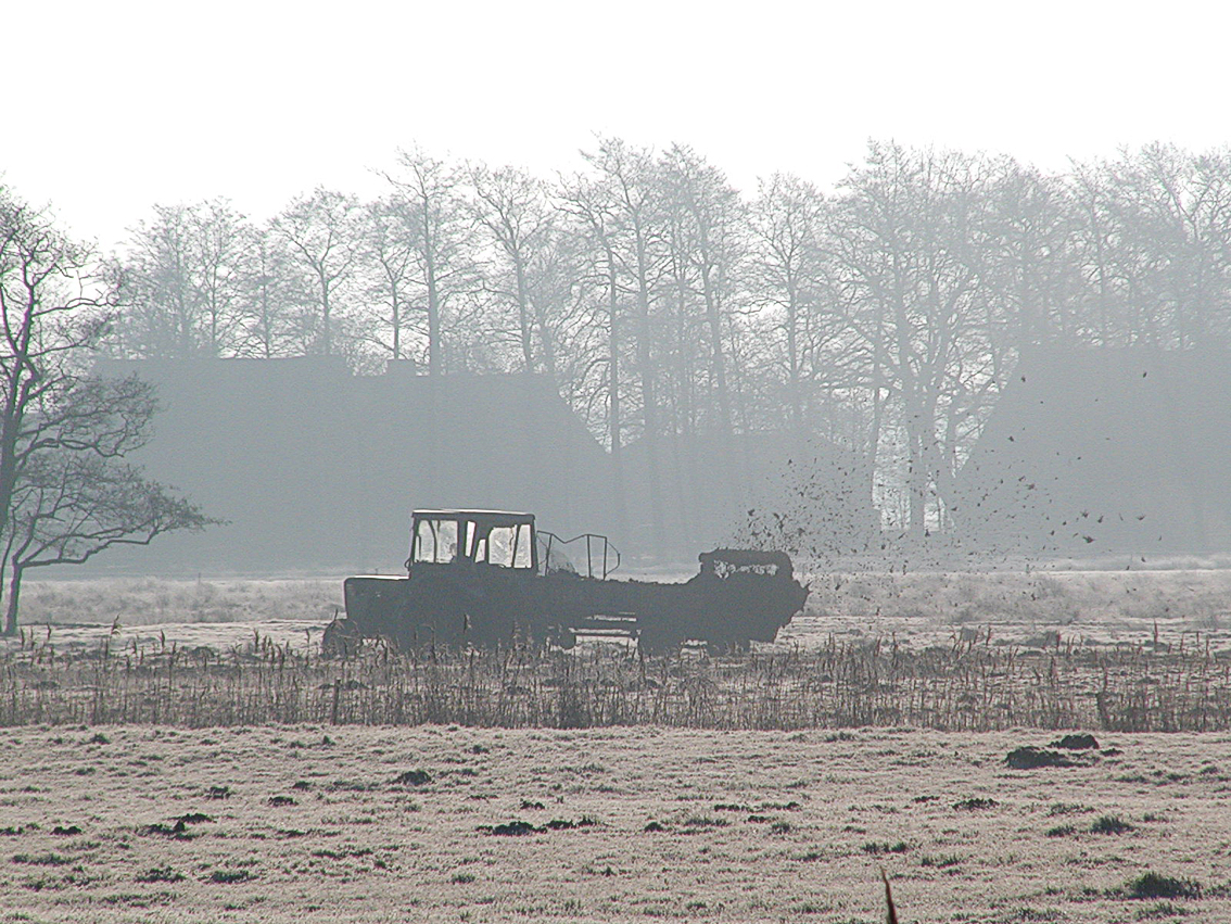 Ein Bauer beim Mist fahren im Moor bei Oppeln, da der Boden gefroren ist, muß der Bauer auch am Sonntag nach der Kirche fahren.